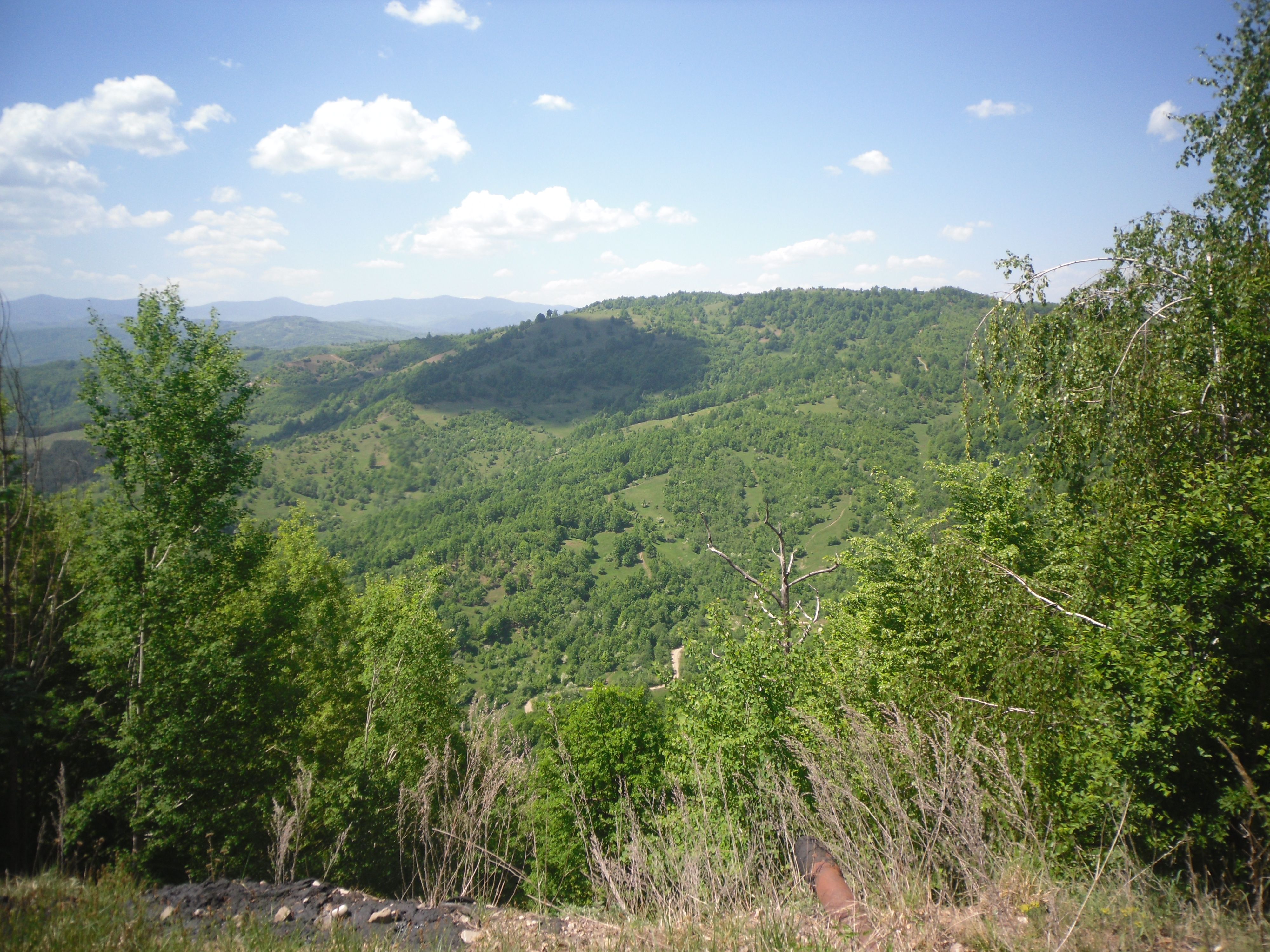 Dealul Cireșoaia văzut de pe dealul Măgura.